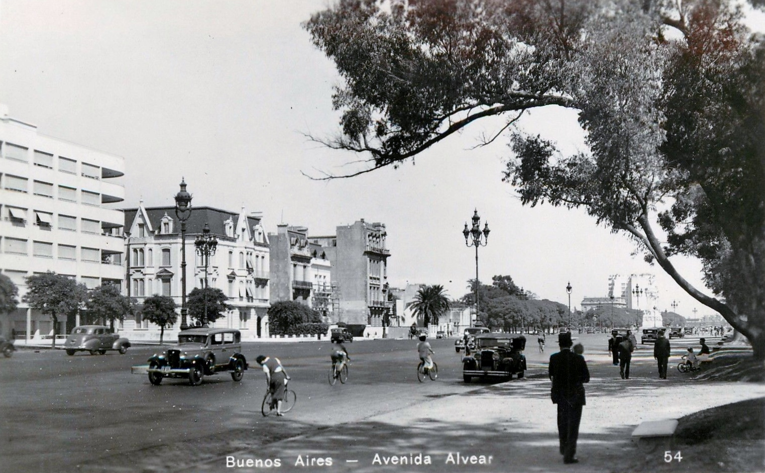 La Avenida Alvear (actuar Avenida del Libertador) a su paso por el barrio de Palermo, en cercanías del Monumento de los Españoles ( Monumento a La Carta Magna y las Cuatro Regiones Argentinas) en la década de 1930.